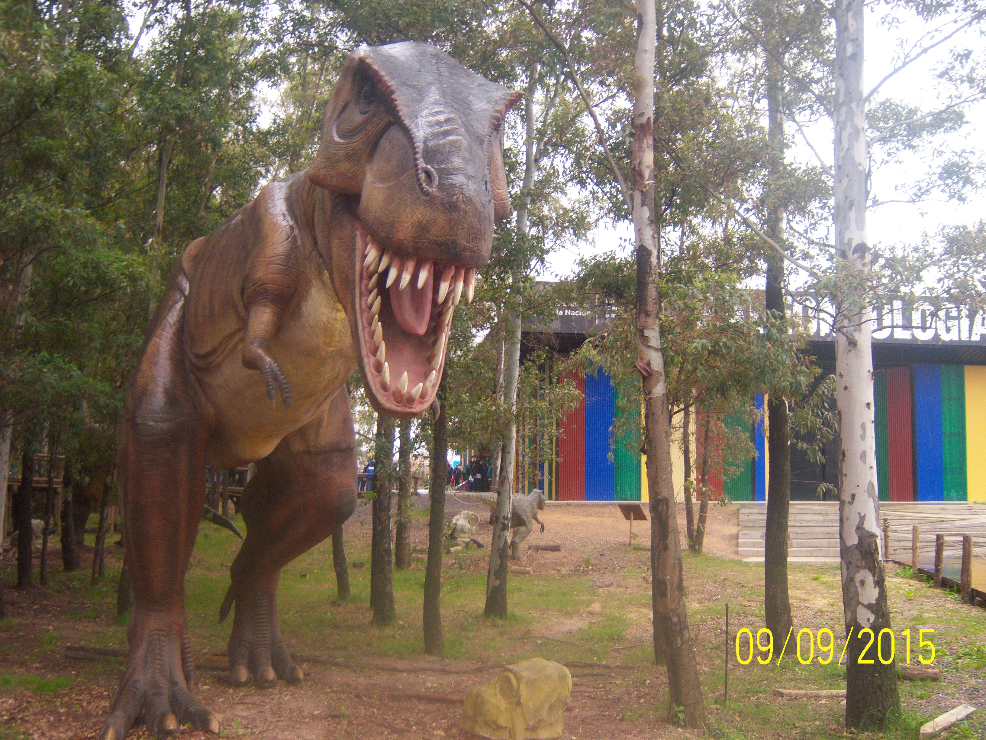 Dinosaurio representado con sus proporciones u medidas reales. Muy impresionante.